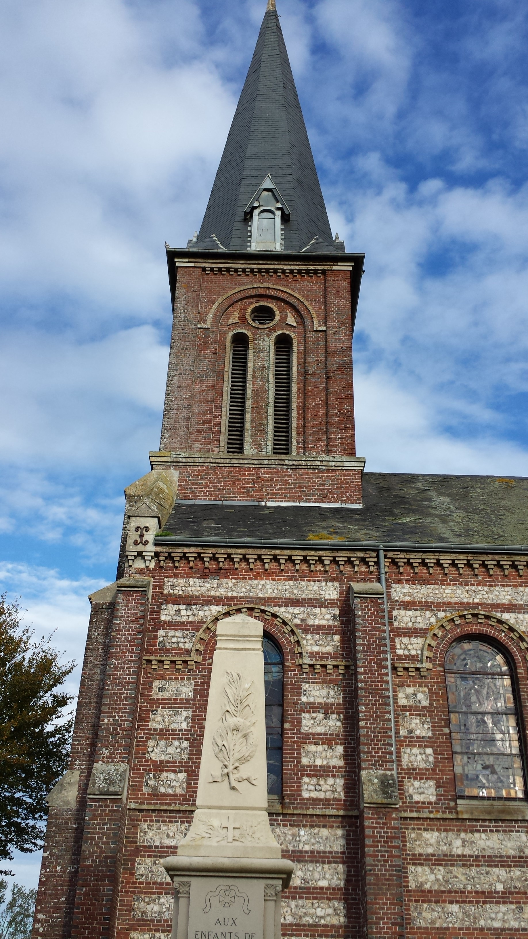 Monument aux morts face à l'église